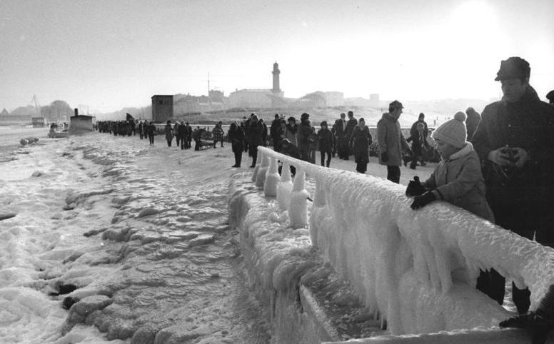 Warnemünde, Mole, Winter ADN-ZB Sindermann 9-1-79-Bau Bez. Rostock: Einen dicken Schnee- und Eispanzer haben in diesen Tagen Strand und Mole von Warnemünde angelegt. Wei man sieht, ist das Ostseebad nicht nur in den Sommermonaten Anziehungspunkt zahlreicher Urlauber und Touristen.